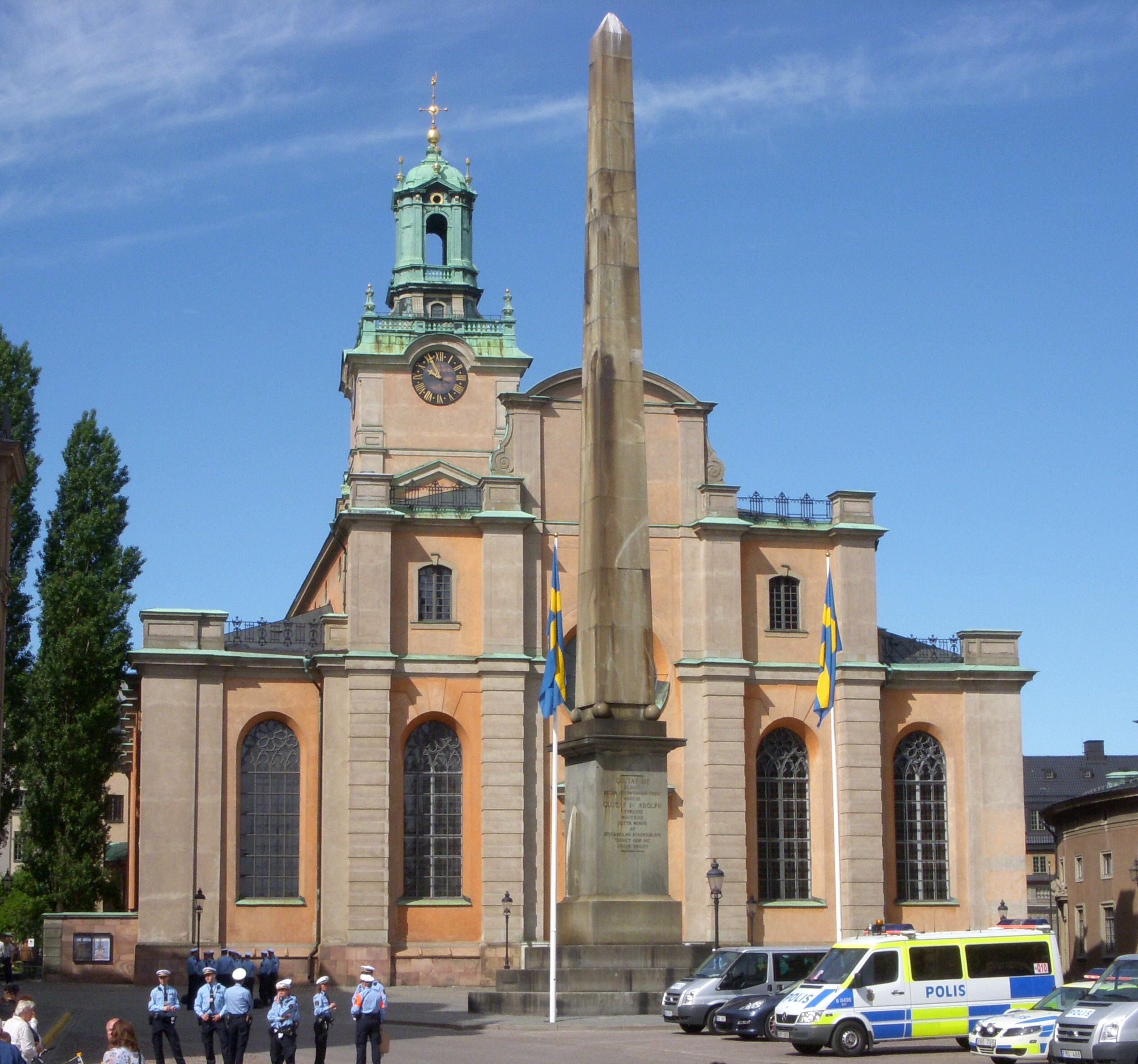 Storkyrkan i Stockholm, fasad mot öst och Slottsbackens obelisk